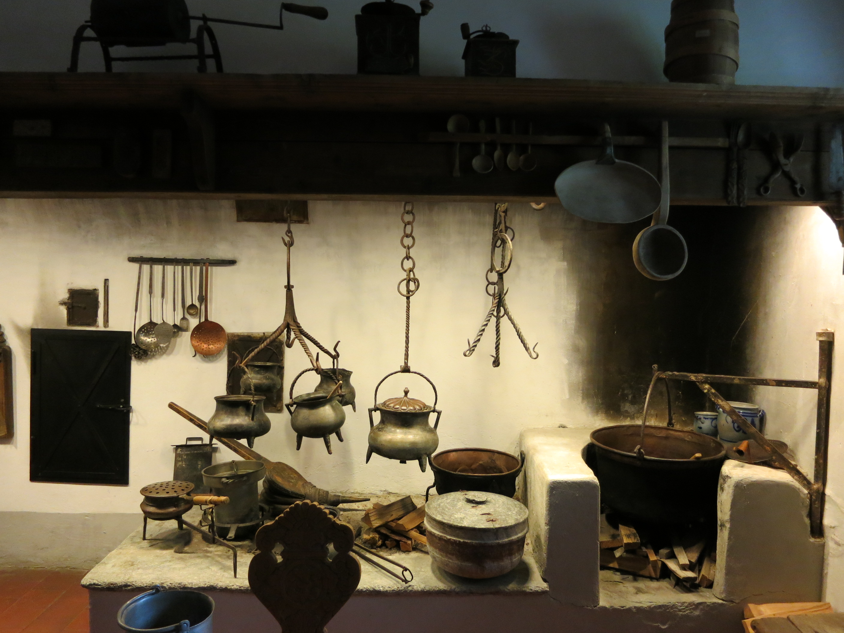 Küche, Engadiner Musem, St. Moritz GR, Schweiz